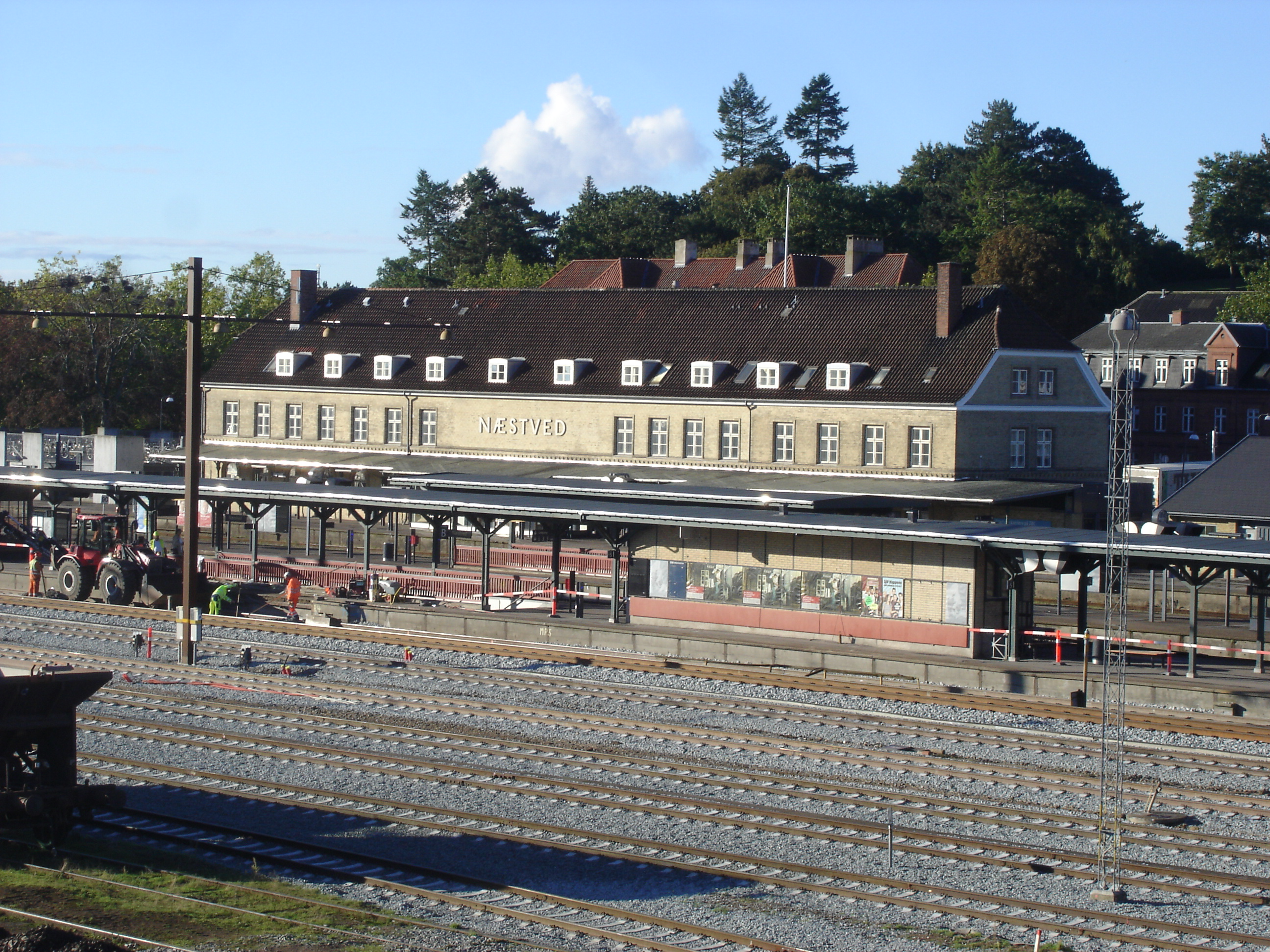 Næstveds ny station